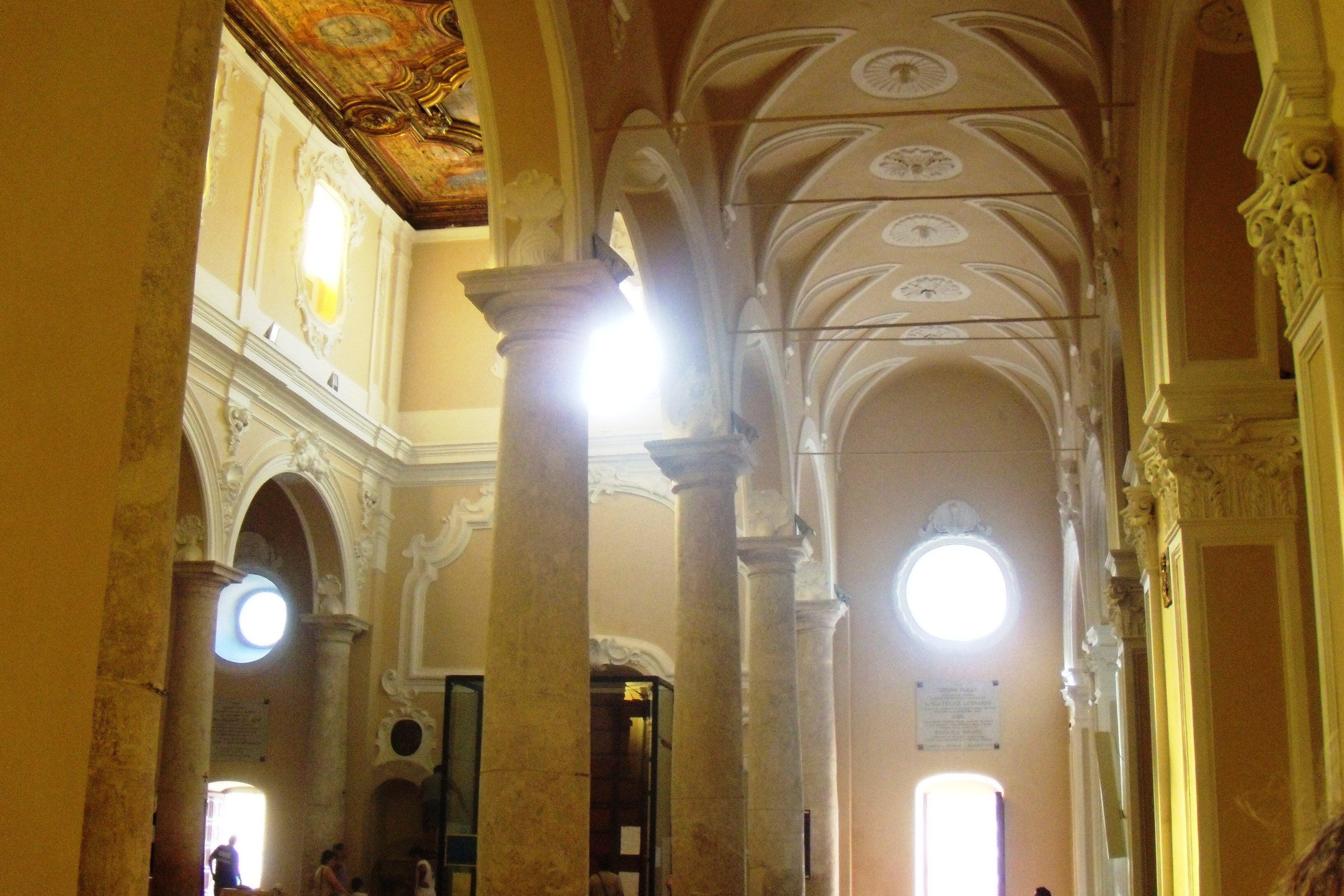 Scorcio dell'interno del Santuario basilica dell'Assunta in Guardia Sanframondi (Italia).